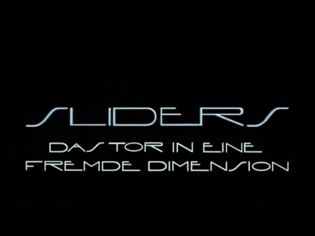 Logo der Fernsehserie Sliders in Originalfarbe